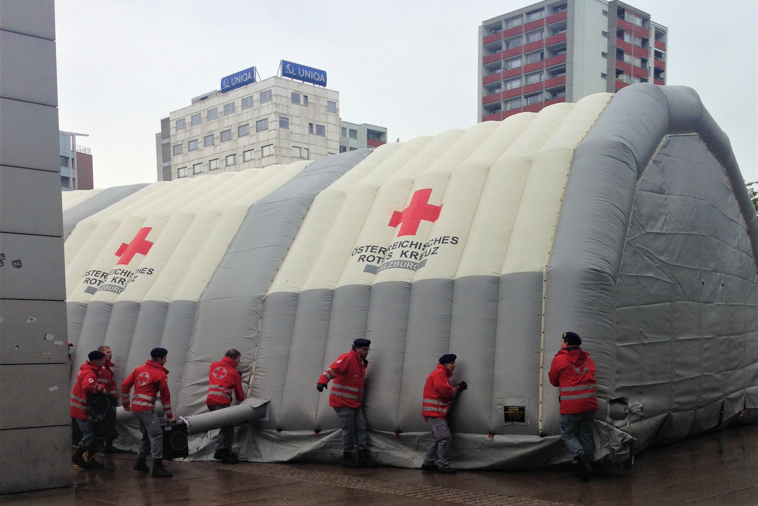 Notzelt zur Erstaufnahme des Österreichisches Rotes Kreuz am Salzburg Hauptbahnhof